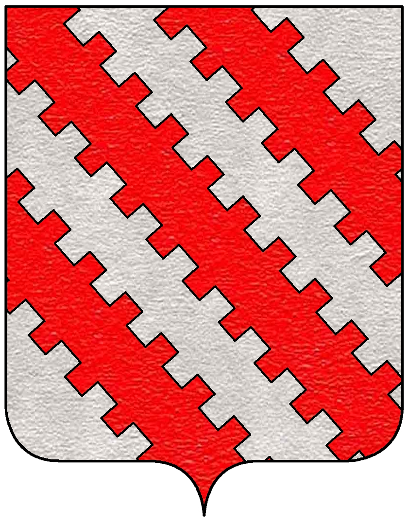 Stemma della famiglia bresciana degli Avogadro, un ramo della quale fu anche ammesso al patriziato di Venezia.